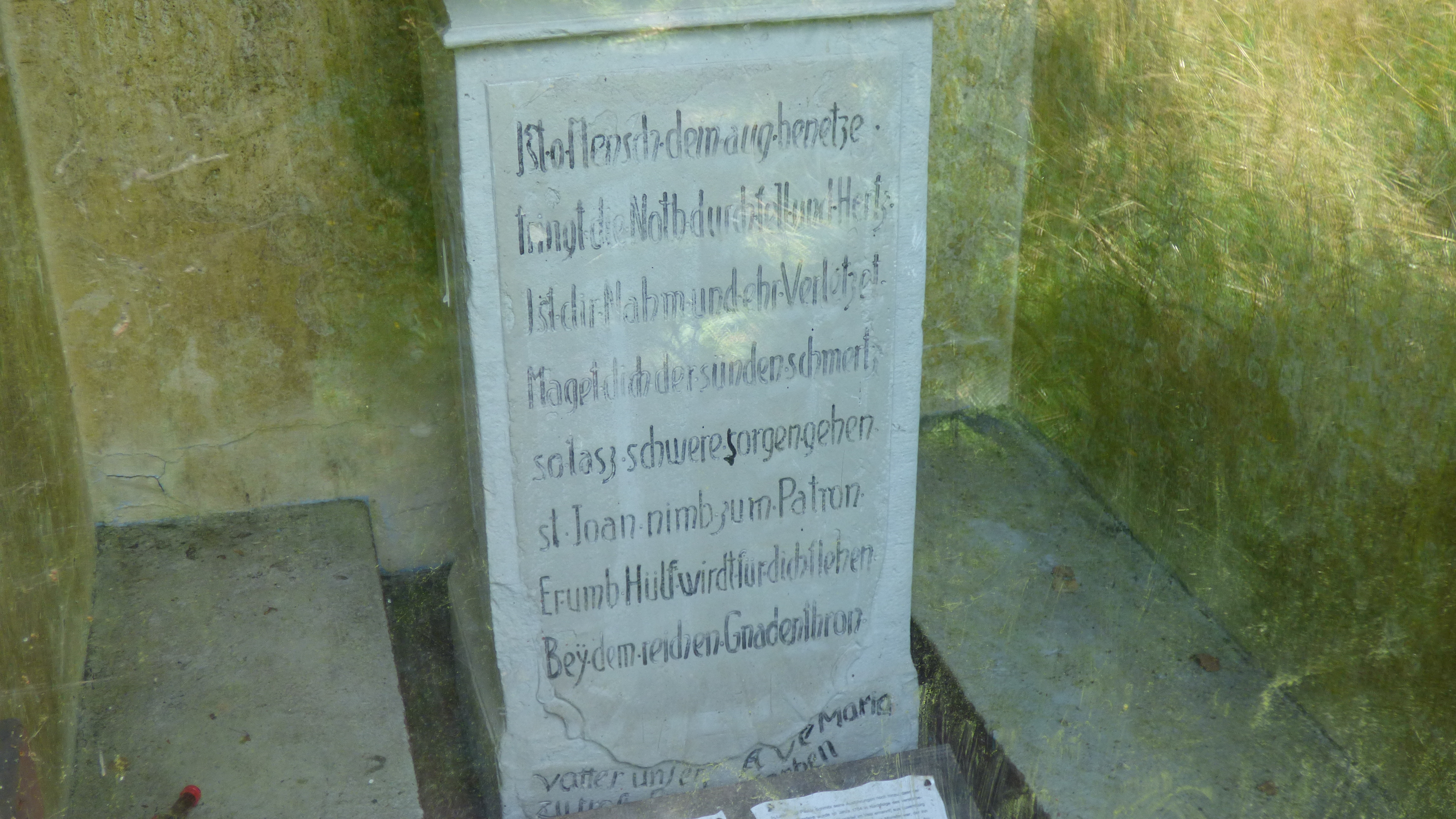 Statue des Hl. Johannes Nepomuk in der Haard. Die zum Teil fehlerhaft restaurierte Inschrift lautet: Ist o Mensch dein Aug benetzet tringt die Noth durch sell und Hertz Ist dir Nahm und ehr Verletzet Naget dich der sünden schmertz so laß schwere sorgen gehen st Joan nimb zum Patron Er umb Hülf wirdt für dich flehen Bey dem reichen Gnadenthron This is a photograph of an architectural monument., no. 0